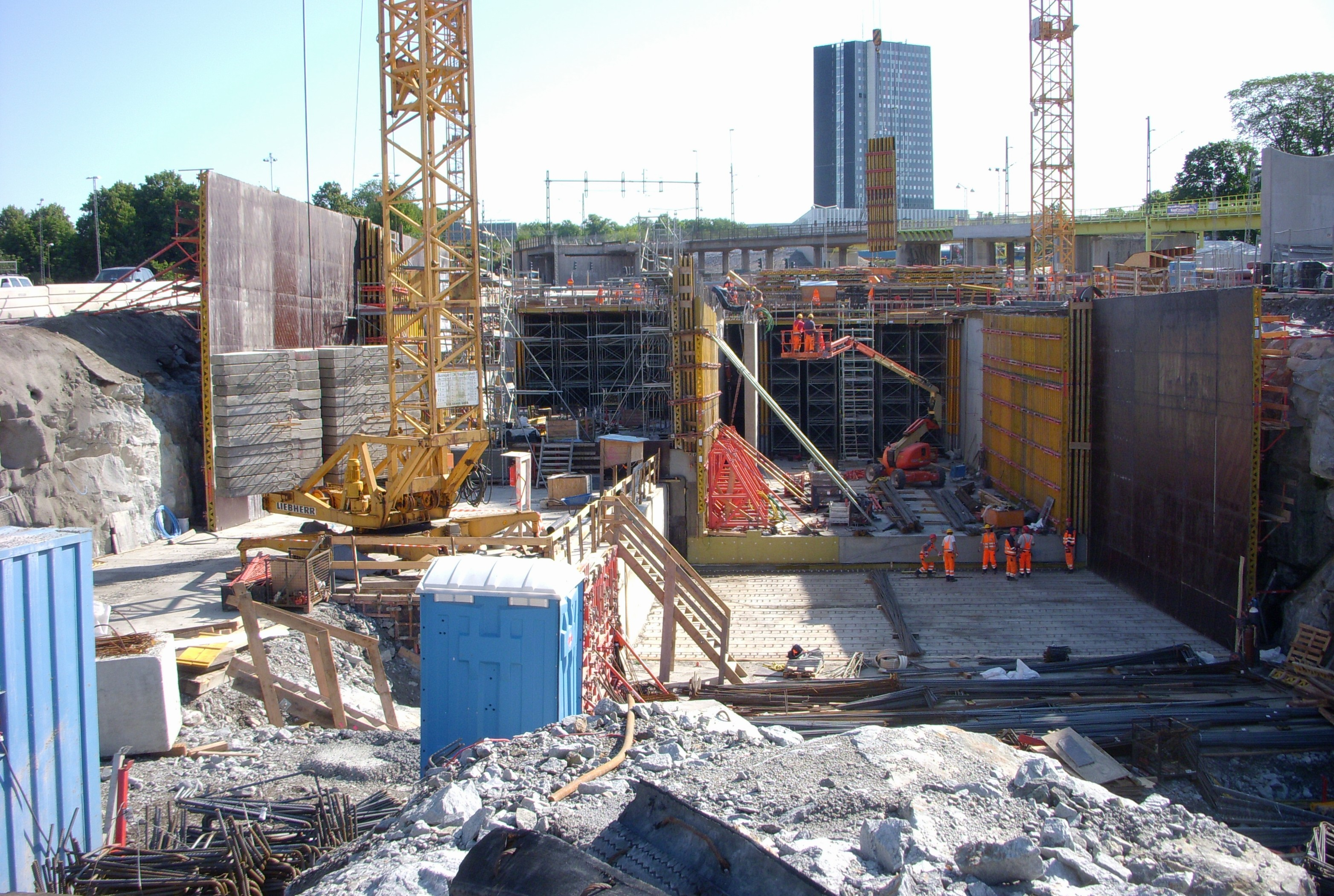 Norra Länken, tunnelbygget vid Norrtull, vy mot nordöst